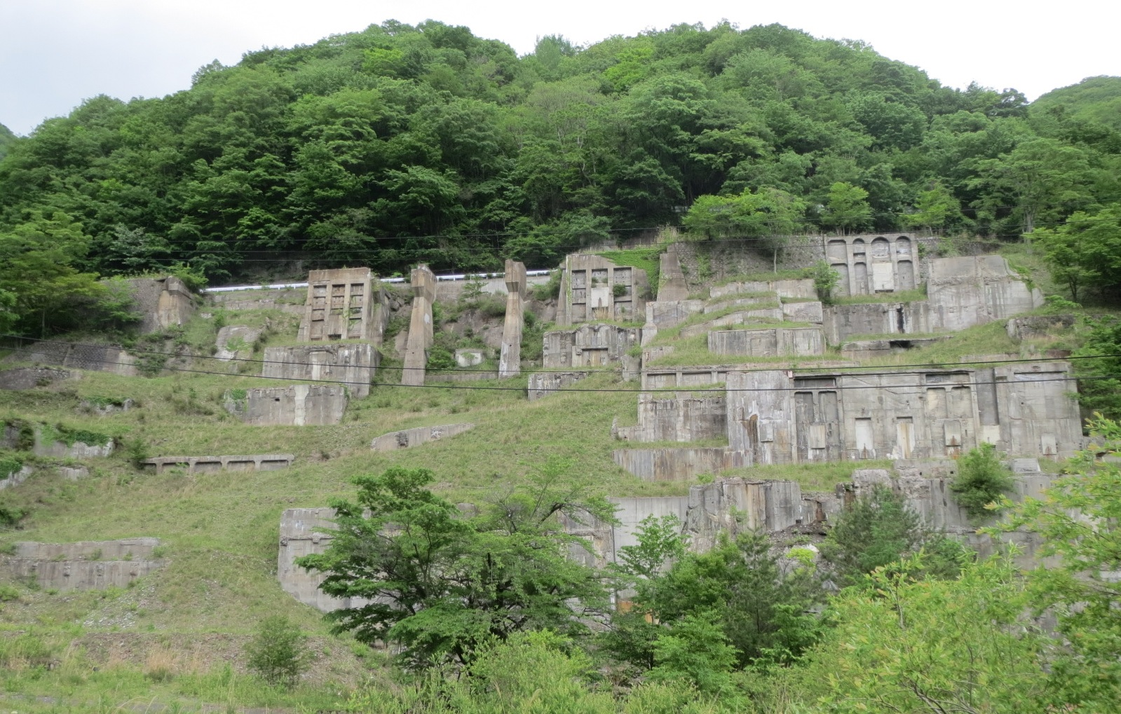 釜石鉱山跡